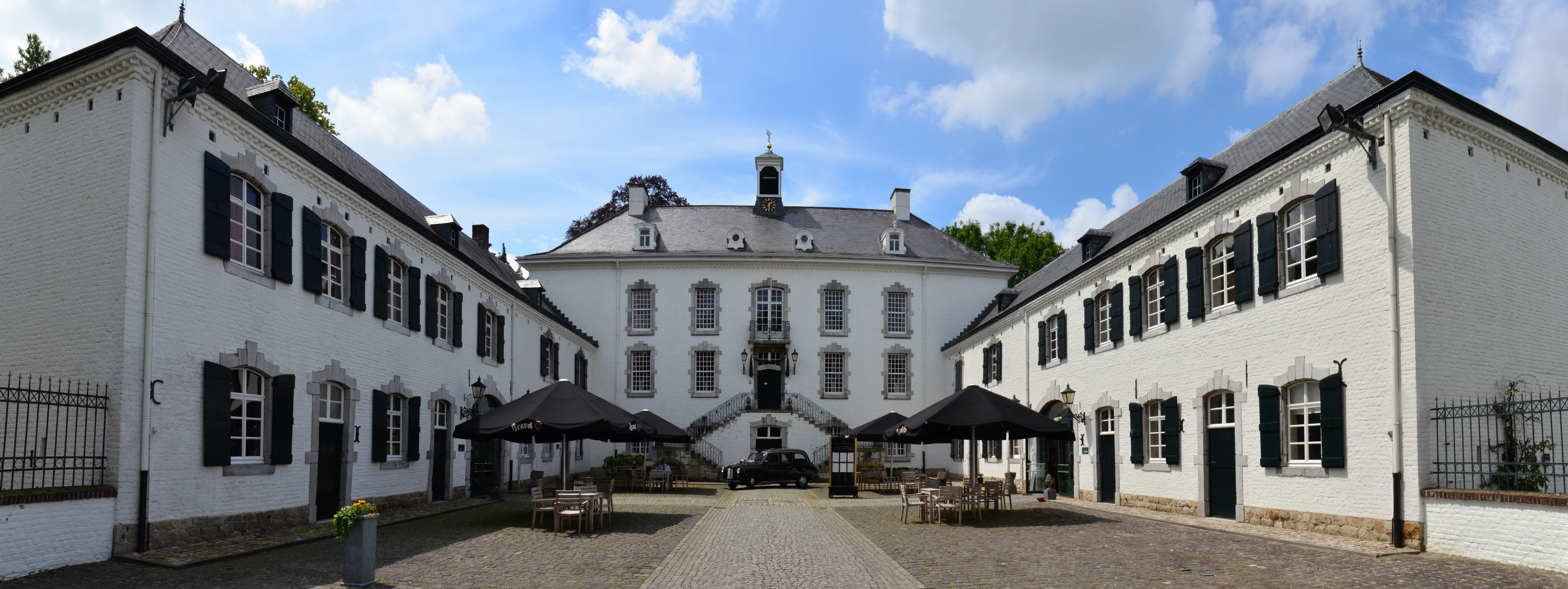 Schloss Vaalsborek, Panorama des Innenhofs This image was created with Hugin